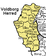 Voldby Herred Roskilde Amt , Denmark. Map by Svend-Erik Christiansen, edited by user:Nico-dk .